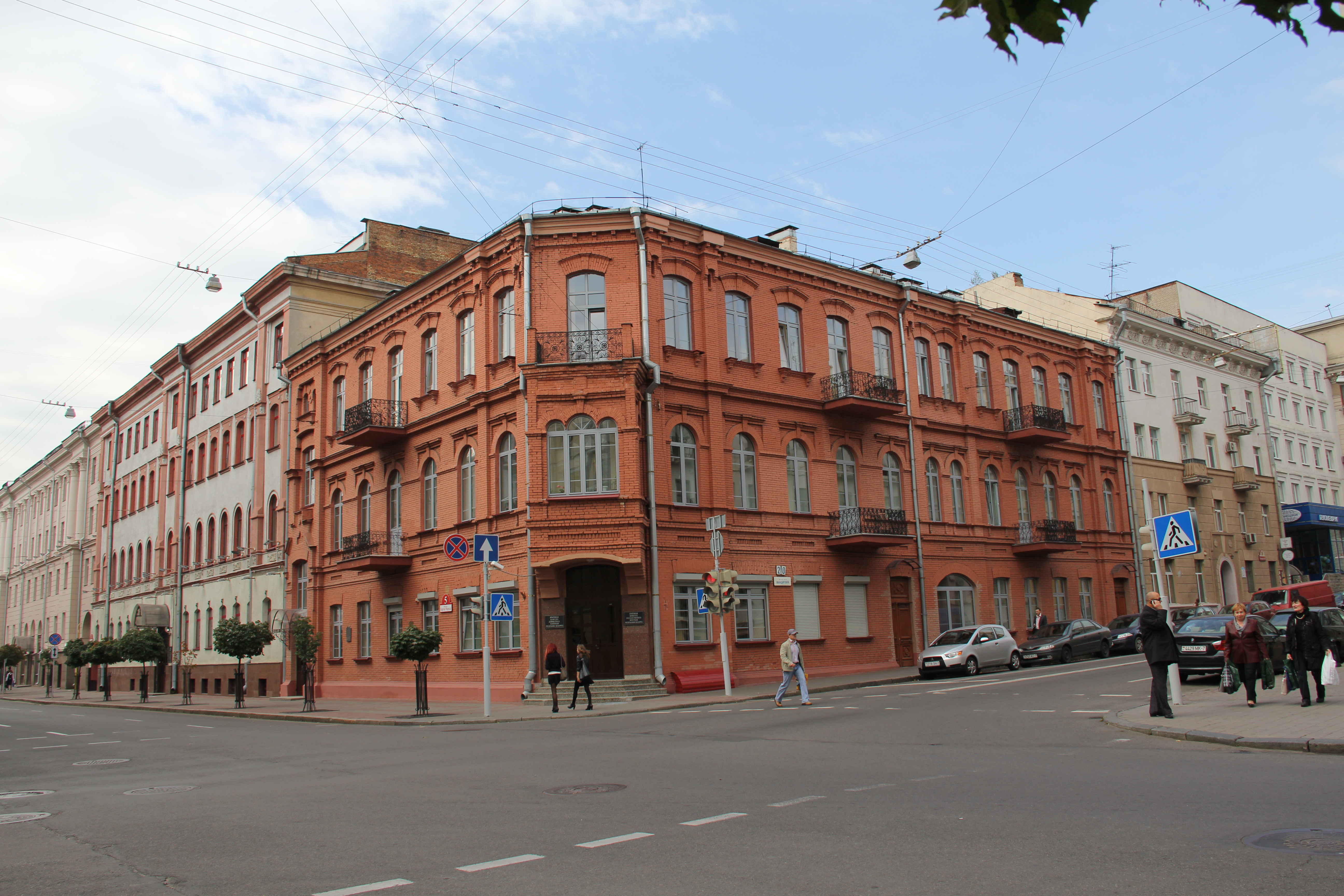 Беларуская (тарашкевіца): Будынак, у якім разьмяшчалася народная міліцыя. г. Менск This is a photo of Belarusian heritage monument. Reference number: 713Г000113 ( WLM)